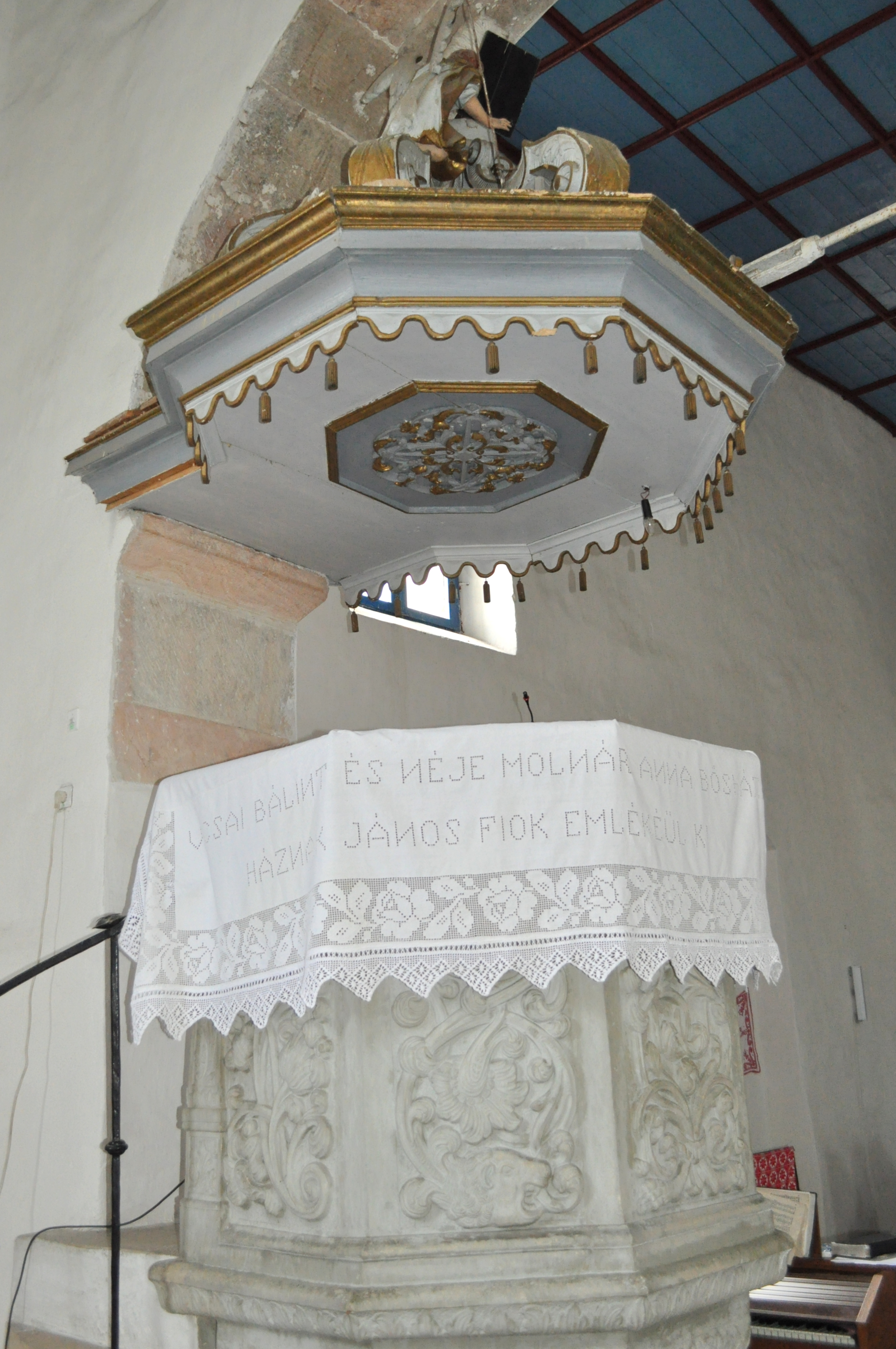 Biserica reformată, sat Bonțida; comuna Bonțida 01